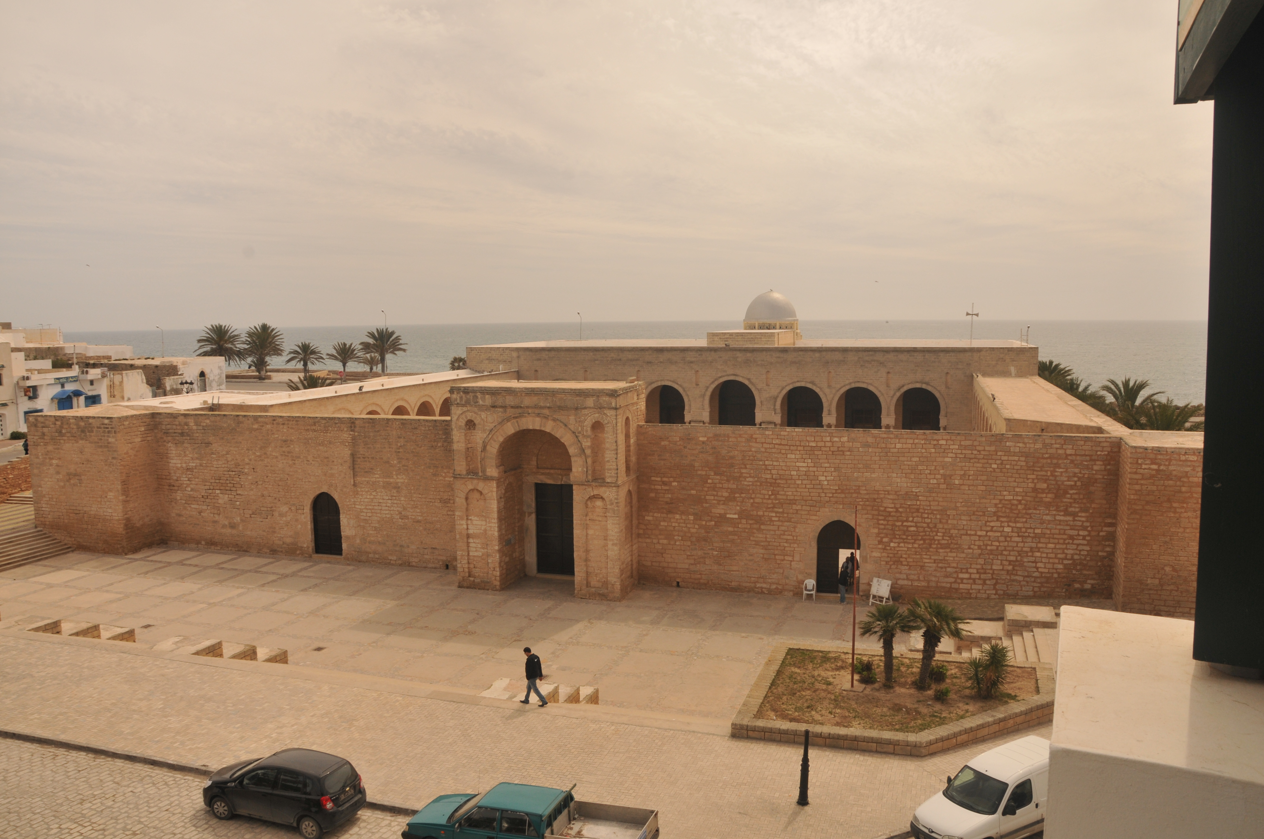 Entrée de la Grande Mosquée de Mahdia, Tunisie